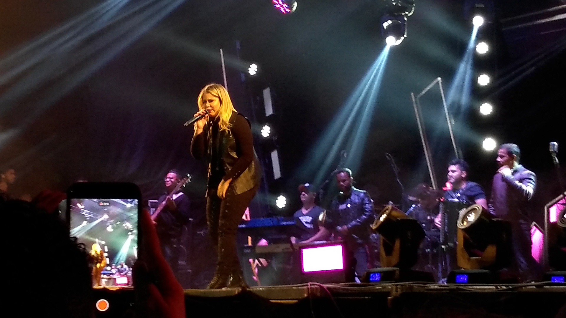 Marília Mendonça da Expo Araçatuba 2018